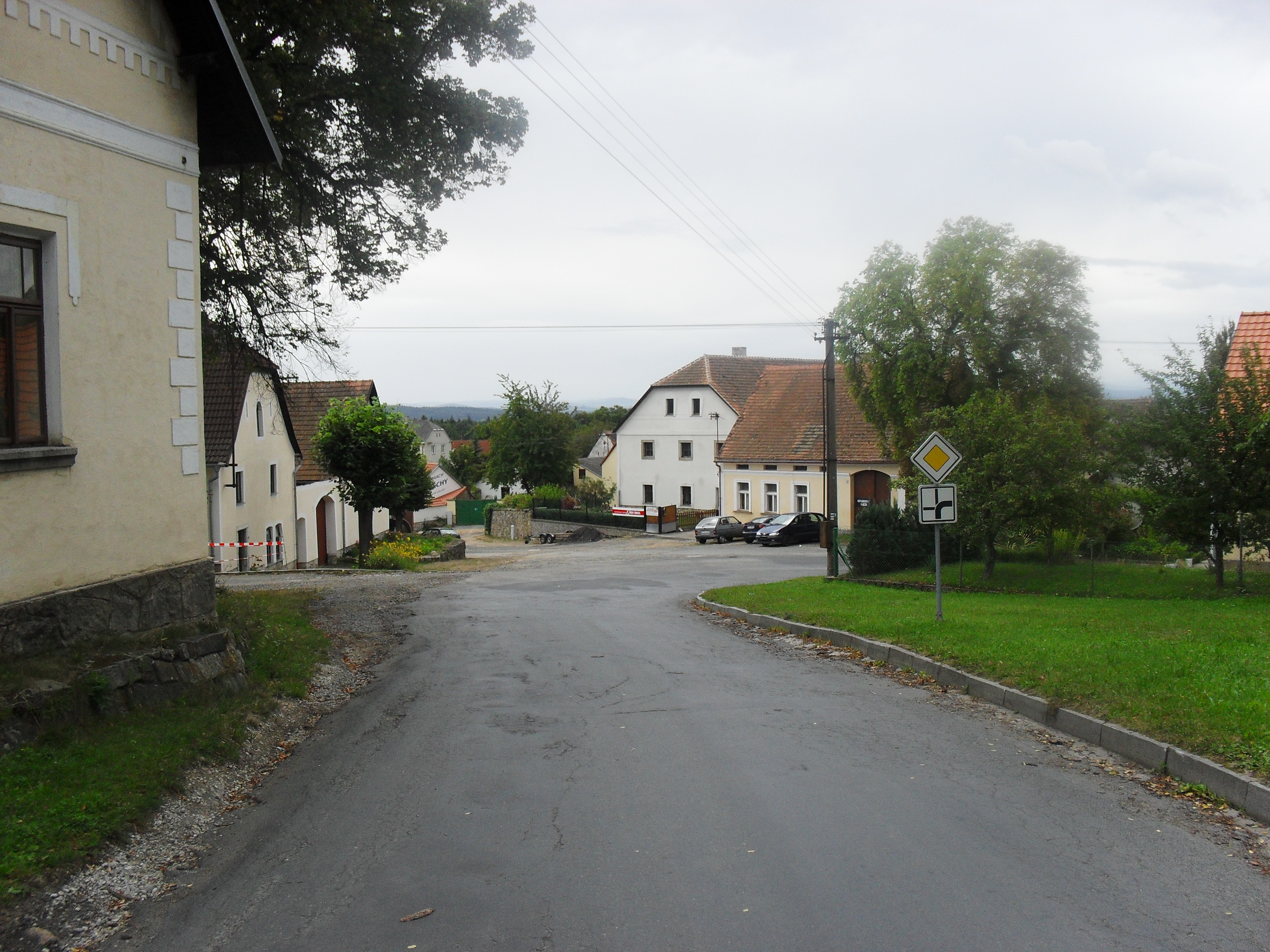 CHANOVICE - náměstí